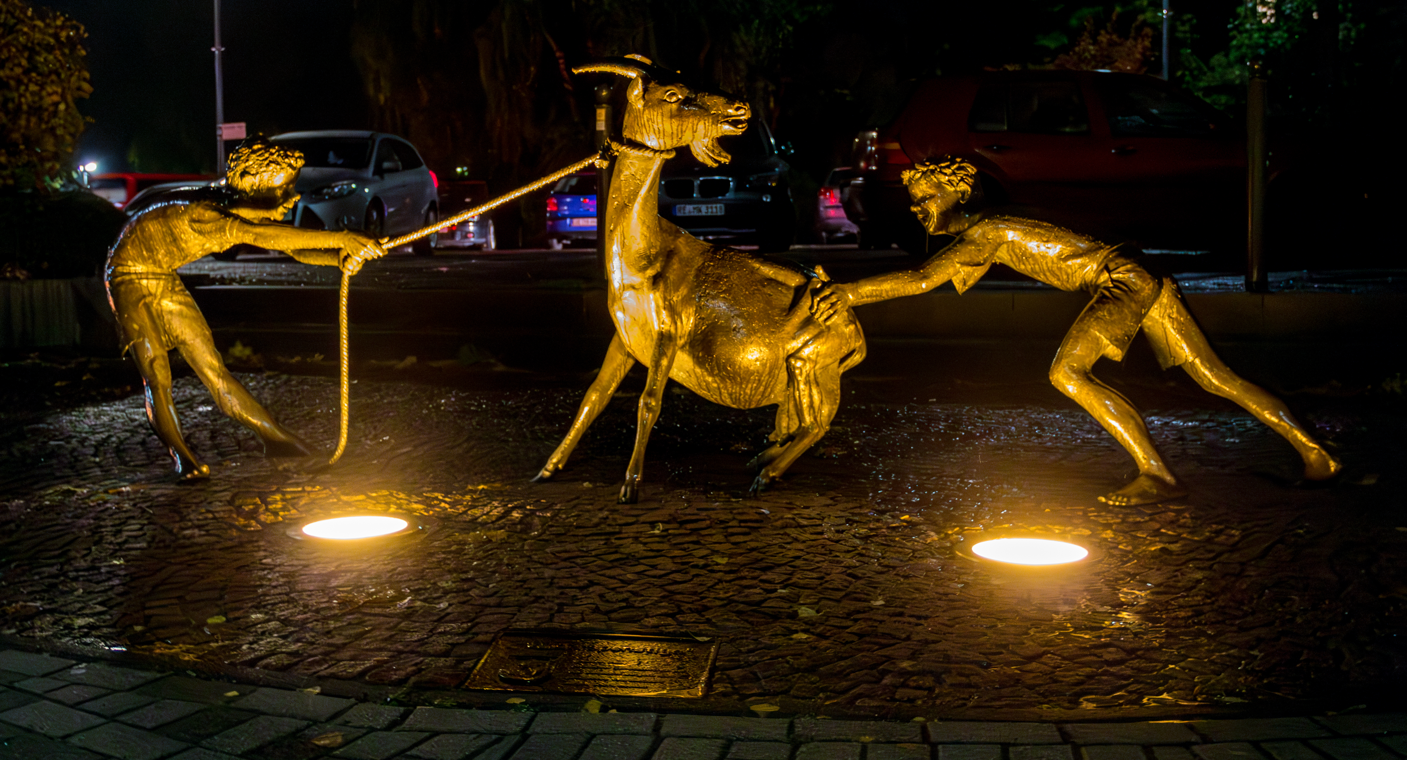 Skulptur „Die Widerspenstige“ (Jürgen Ebert, 1996) am Nieströter Platz in Dülmen Sculpture TitleDie WiderspenstigeArtistJürgen EbertDate1996